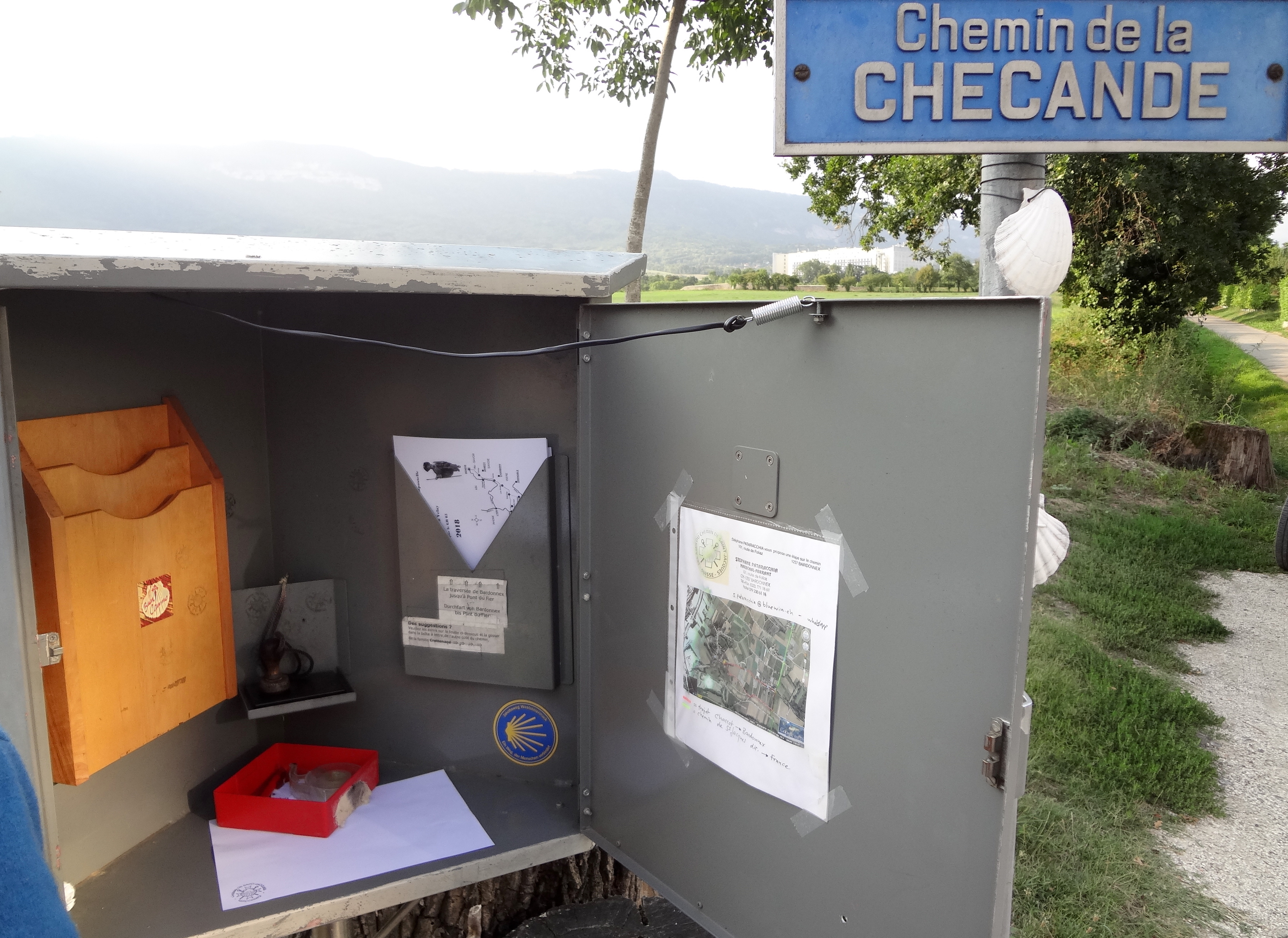 Station sur le chemin de Saint-Jacques à Charrot, commune de Bardonnex, canton de Genève (Suisse).